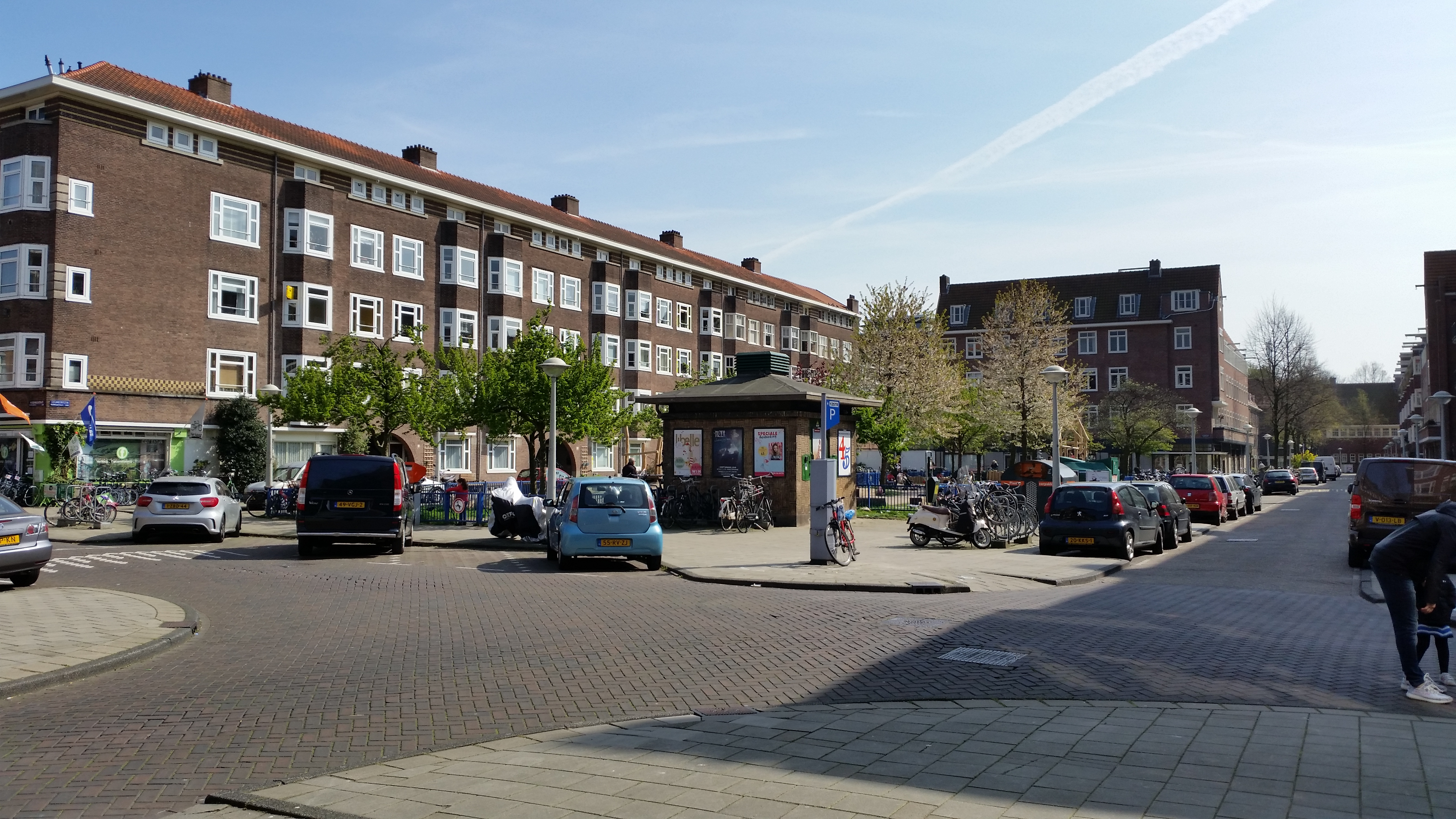 Overzicht over het Legmeerplein, Amsterdam